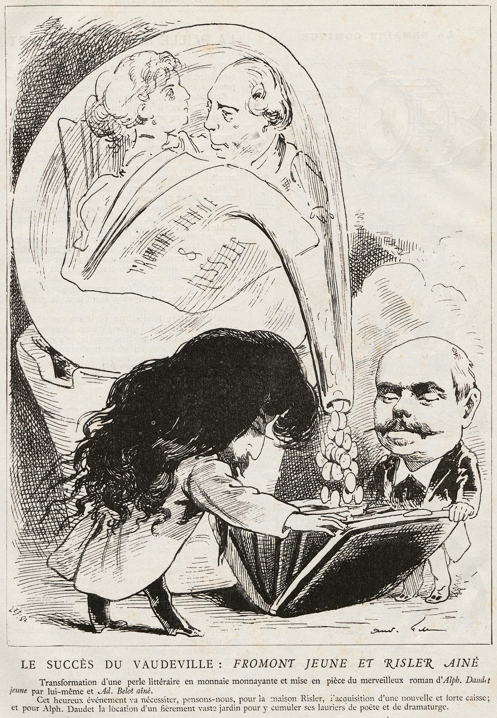 "Le succès du Vaudeville : Fromont jeune et Risler ainé".